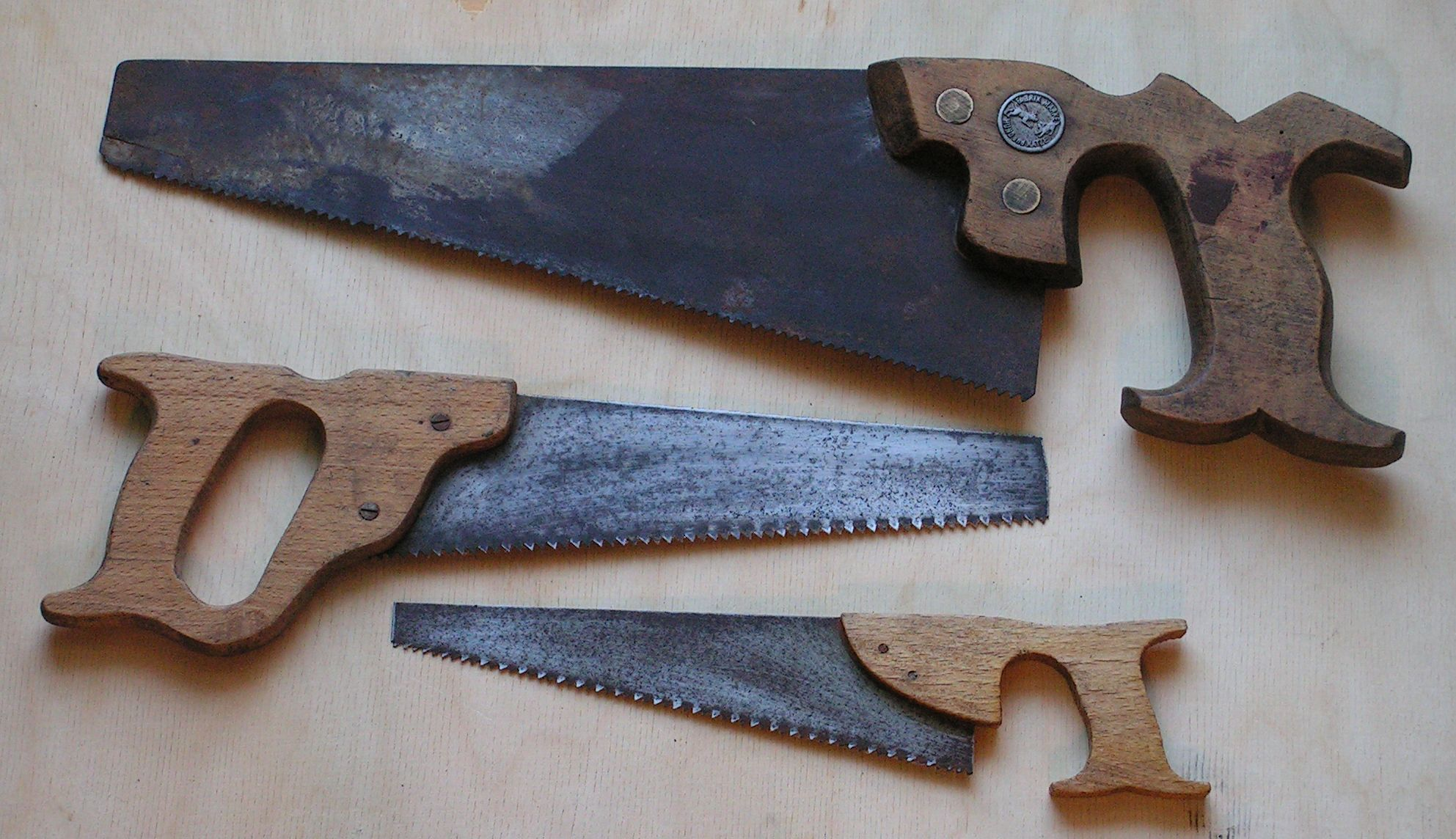 Piły jednouchwytowe - rozpłatnice.